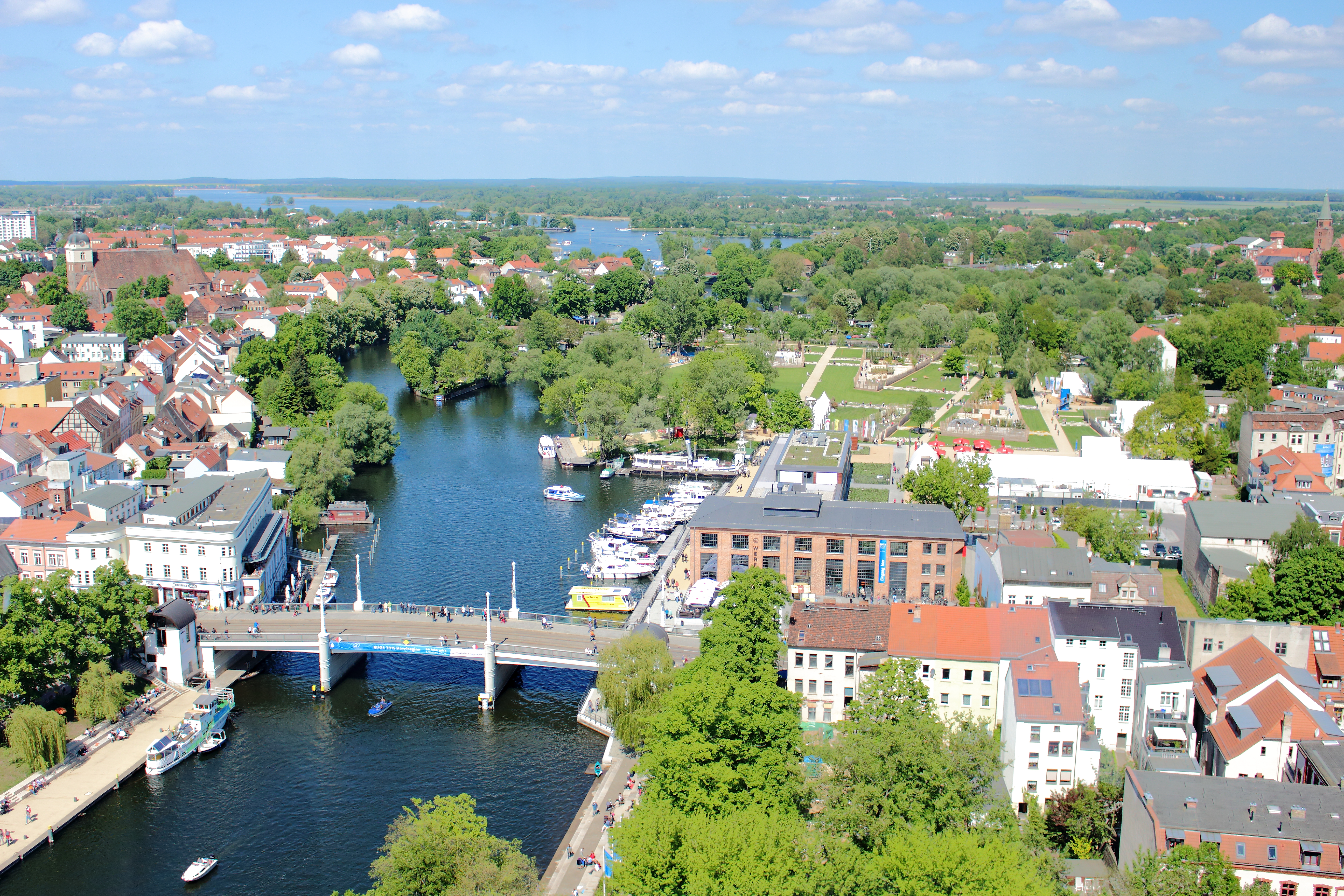 Jahrtausendbrücke in Brandenburg an der Havel mit BUGA-Gelände, fotografiert vom Skyliner